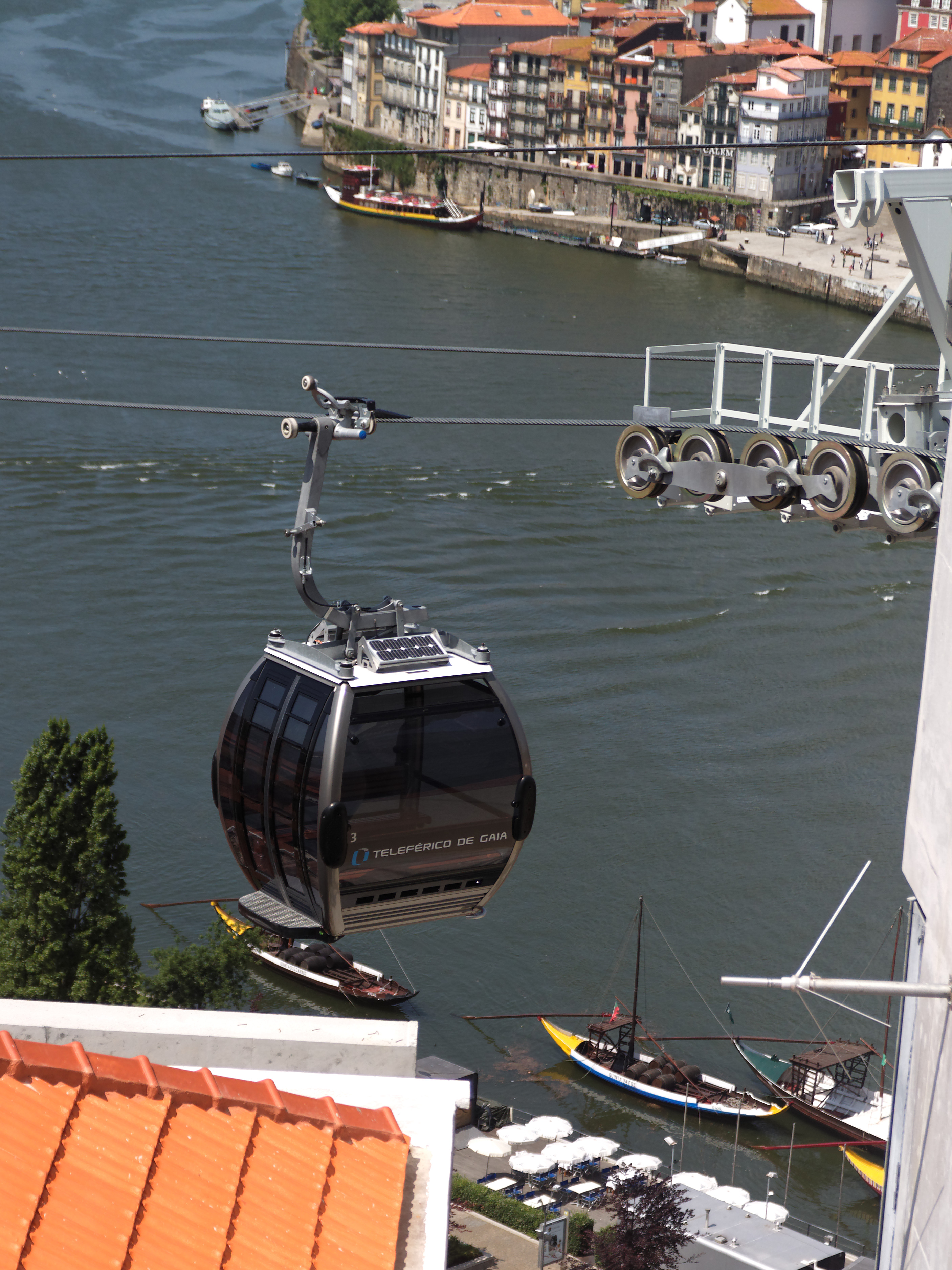 Una cabina del nuevo teleférico de Gaia, Portugal.